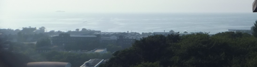 彦根市中心部